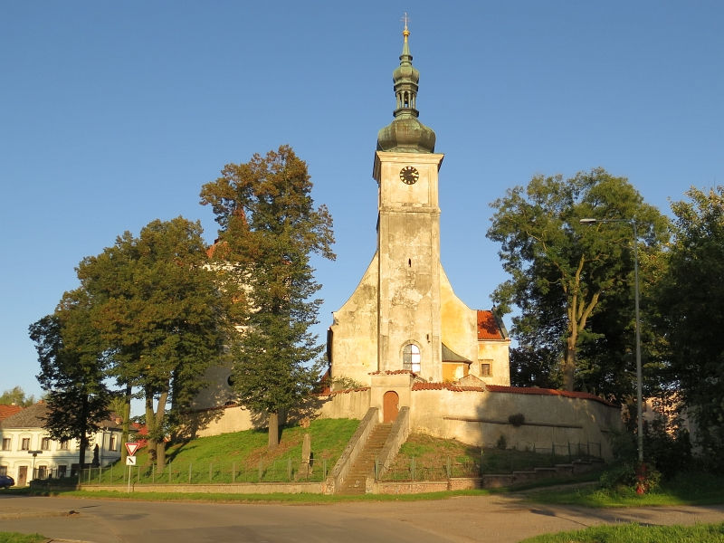 Kostel svatého Prokopa, jižní strana návsi, Chotětov.